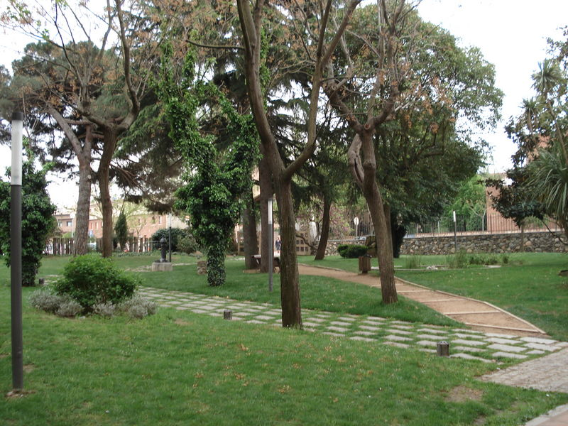 Jardins de la Rectoria Vella de Sant Celoni foto ZztopzZ